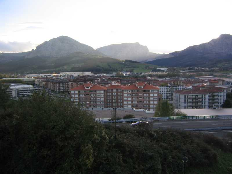 Vista geneal del barrio de Traña-Matiena. Vista pacial de Matiena barrio de Abadiano, Vizcaya, País Vasco, España.